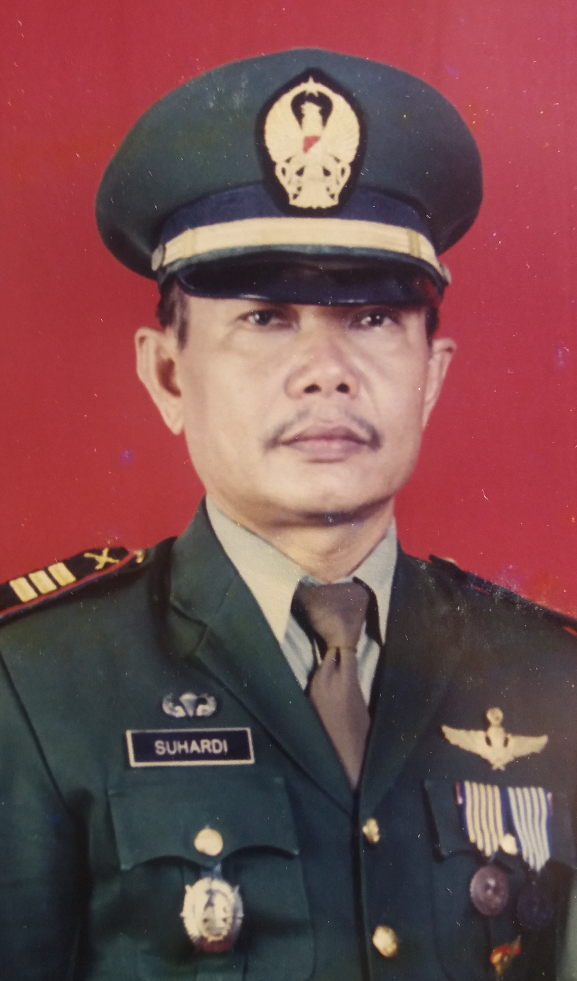 Kapten Inf Suhardi